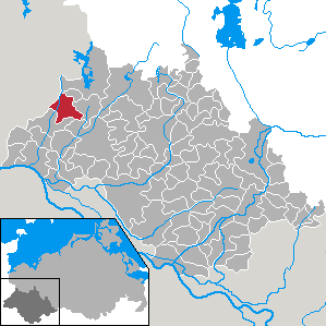 Gallin in Mecklenburg-Vorpommern - district Ludwigslust